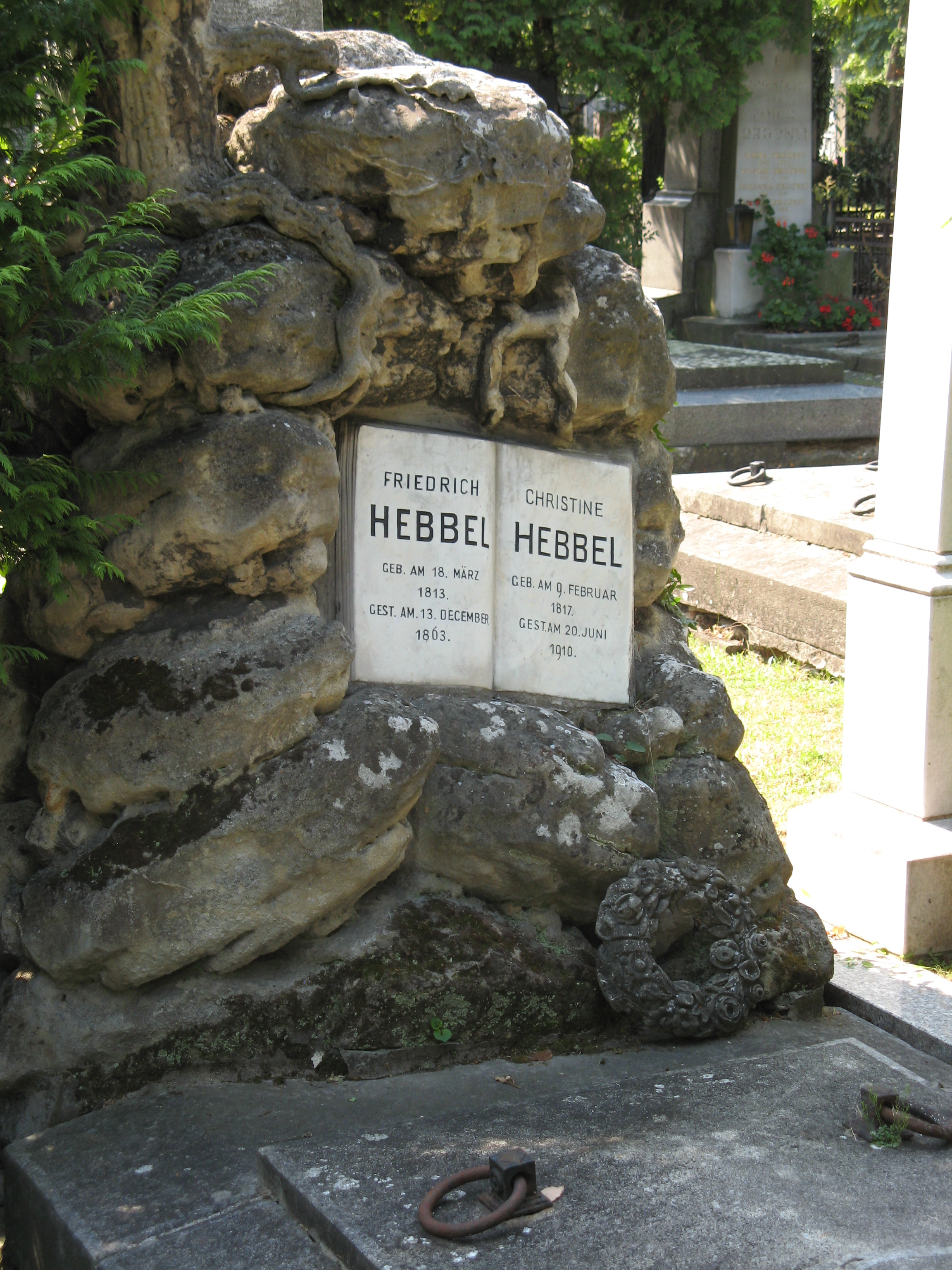 Grab von Friedrich Hebbel auf dem Matzleinsdorfer Evangelischen Friedhof in Wien